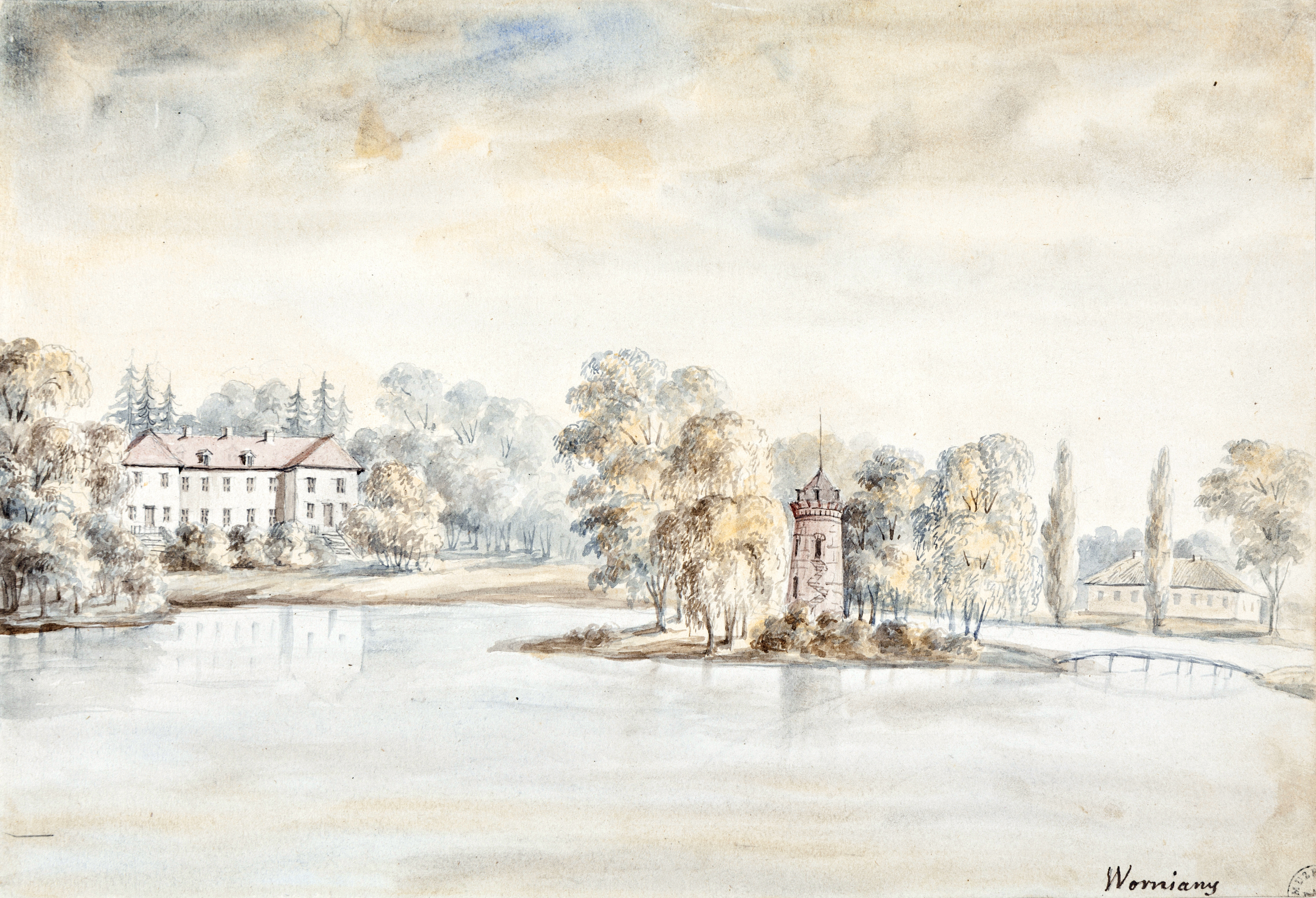 Беларуская (тарашкевіца): Варняны (Varniany), сядзіба Абрамовічаў (Abramovič)